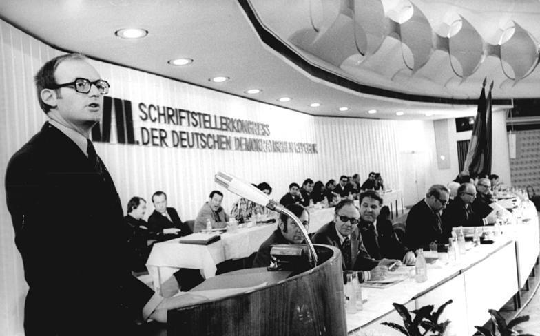 ADN-ZB Katscherowski 14.11.73 Berlin: VII. Schriftstellerkongreß eröffnet Der VII. Schriftstellerkongreß der DDR nahm am Vormittag des 14.11.73 in der Berliner Kongreßhalle seine Arbeit auf. Das Referat des Kongresses über die Rolle der Literatur in der sozialistischen Gesellschaft hielt Hermann Kant. (am Pult). Drei Tage lang werden 240 Delegierte als Vertreter der mehr als 700 Mitglieder des Schriftstellerverbandes sowie rund 100 Gäste hier in Berlin tagen.